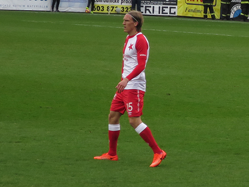 Per-Egil Flo